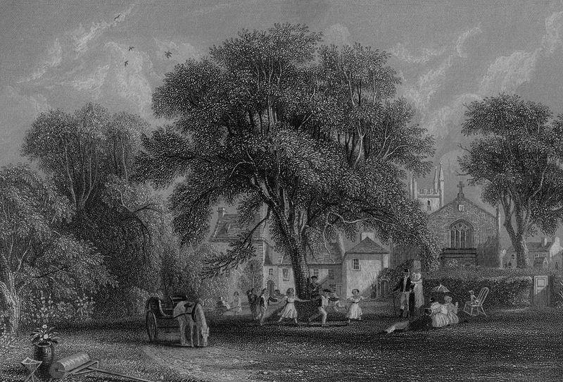 Gravure : La maison de Gavin Hamilton (ami de Robert Burns, à Mauchline (Écosse).